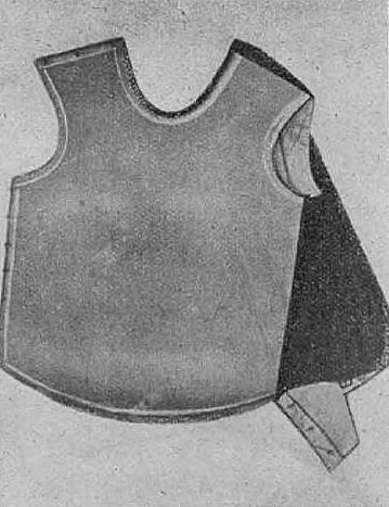 Kamizelka kuloodporna Jana Szczepanika (1901)